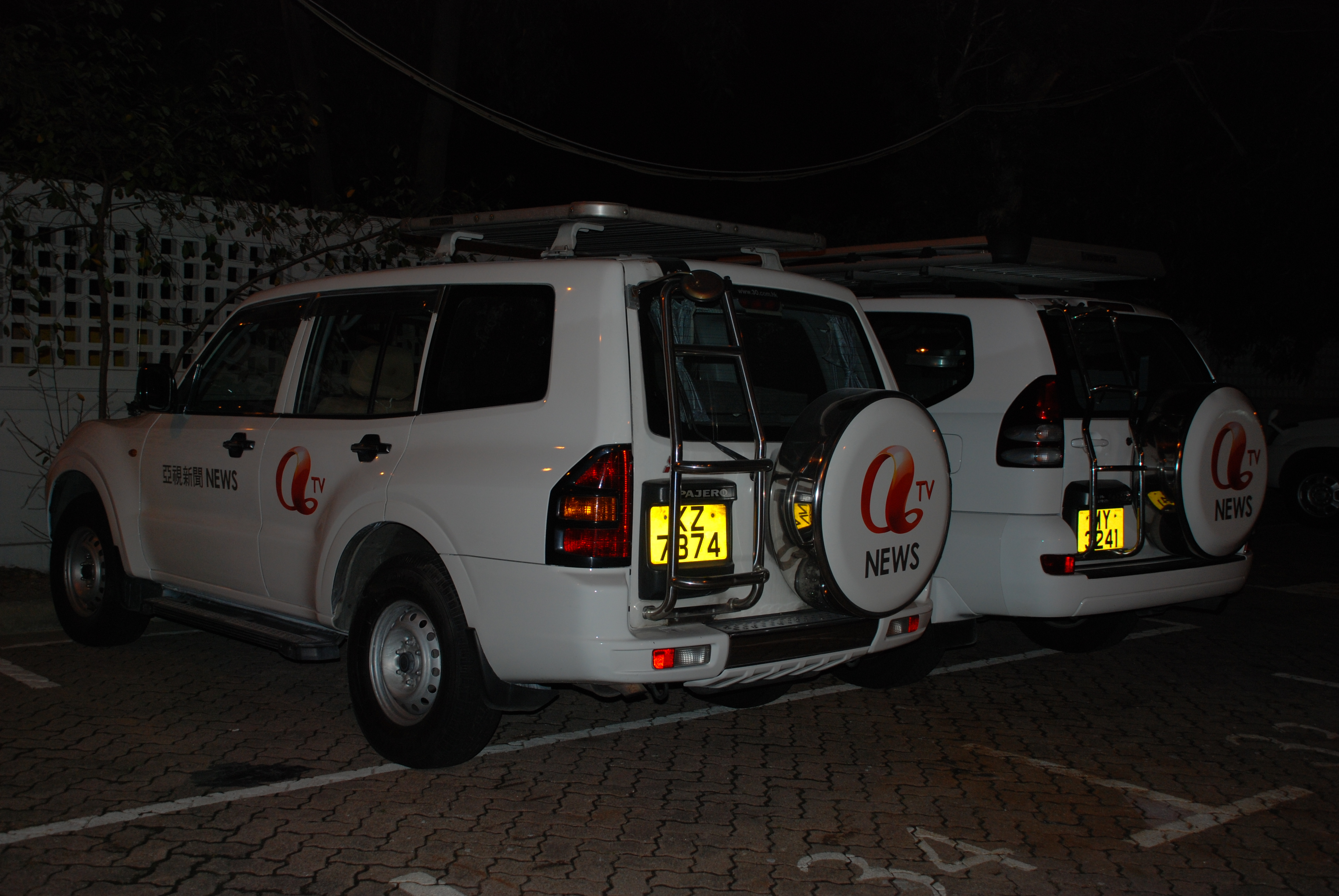 中文（香港）: 亞視新聞採訪車KZ7374（左）與MY3241（右）。